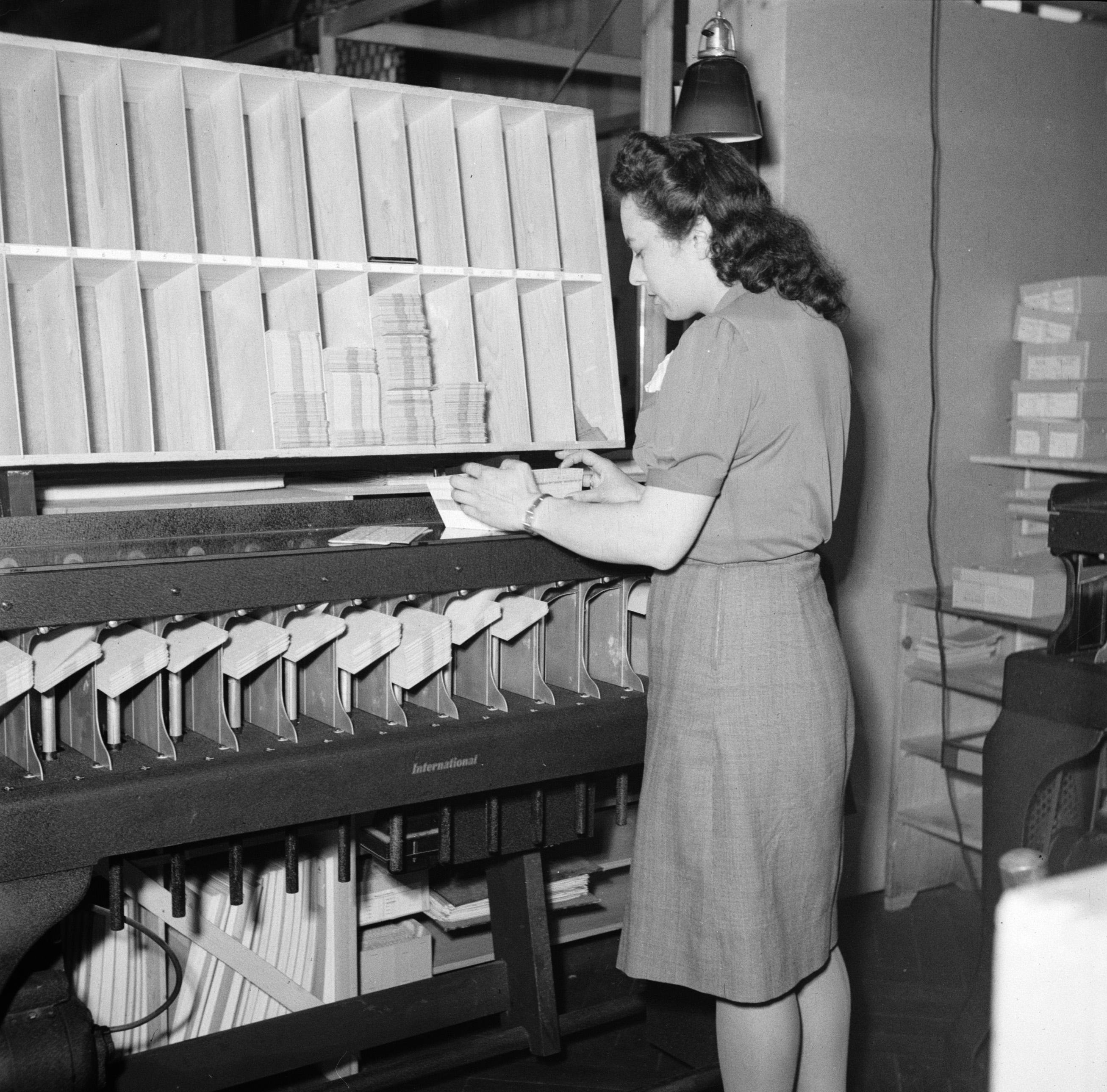 Collectie / Archief : Fotocollectie Van de Poll Reportage / Serie : Rode Kruis In Genève Beschrijving : Vrouw bij een sorteermachine Datum : mei 1946 Locatie : Genève, Zwitserland Trefwoorden : administratief personeel, kantoren Instellingsnaam : Rode Kruis Fotograaf : Poll, Willem van de Auteursrechthebbende : Nationaal Archief Materiaalsoort : Negatief (6x6) Nummer archiefinventaris : bekijk toegang 2.24.14.02 Bestanddeelnummer : 254-2223